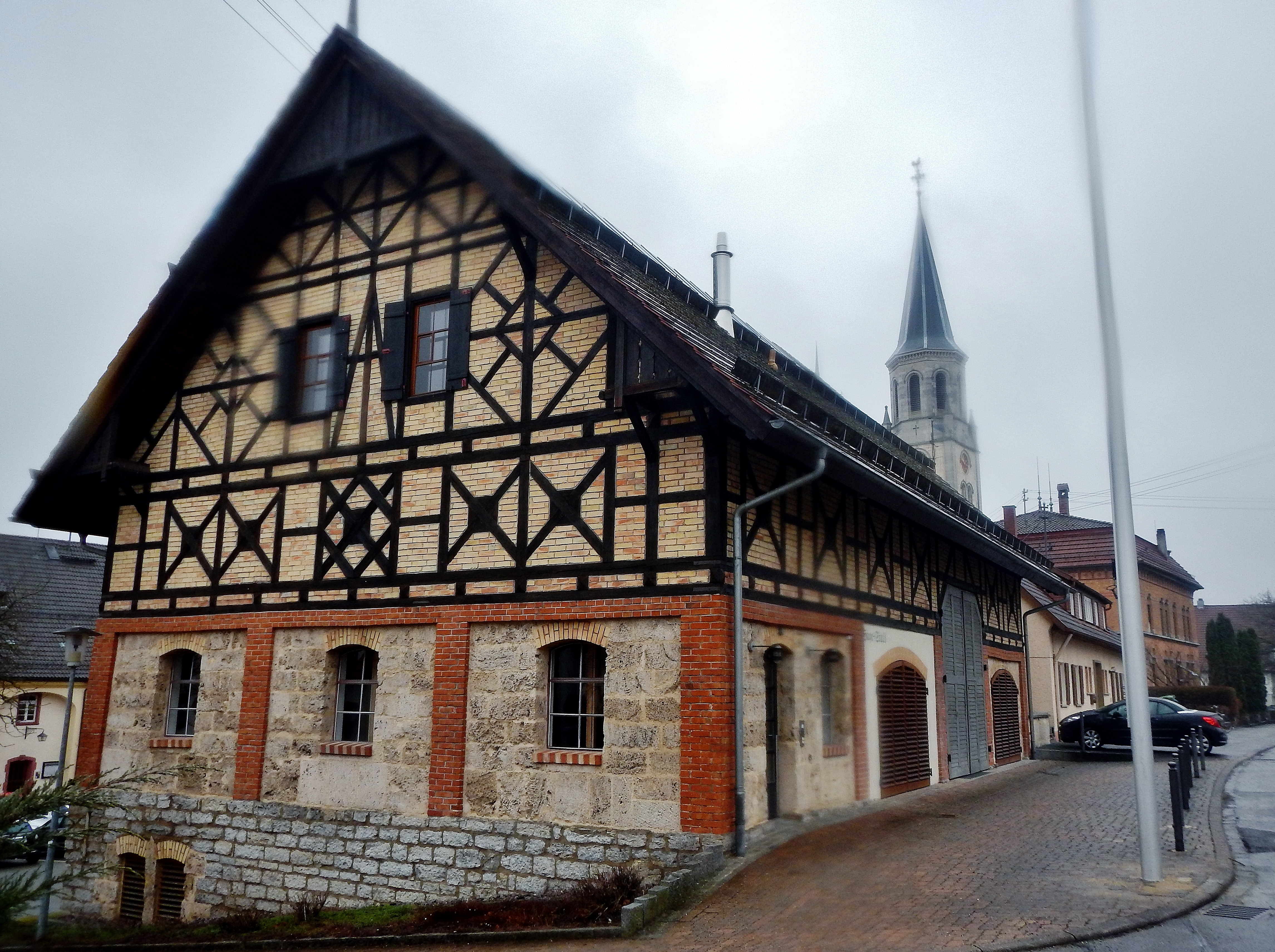 Deißlinger Hagenstall, Haga Stall